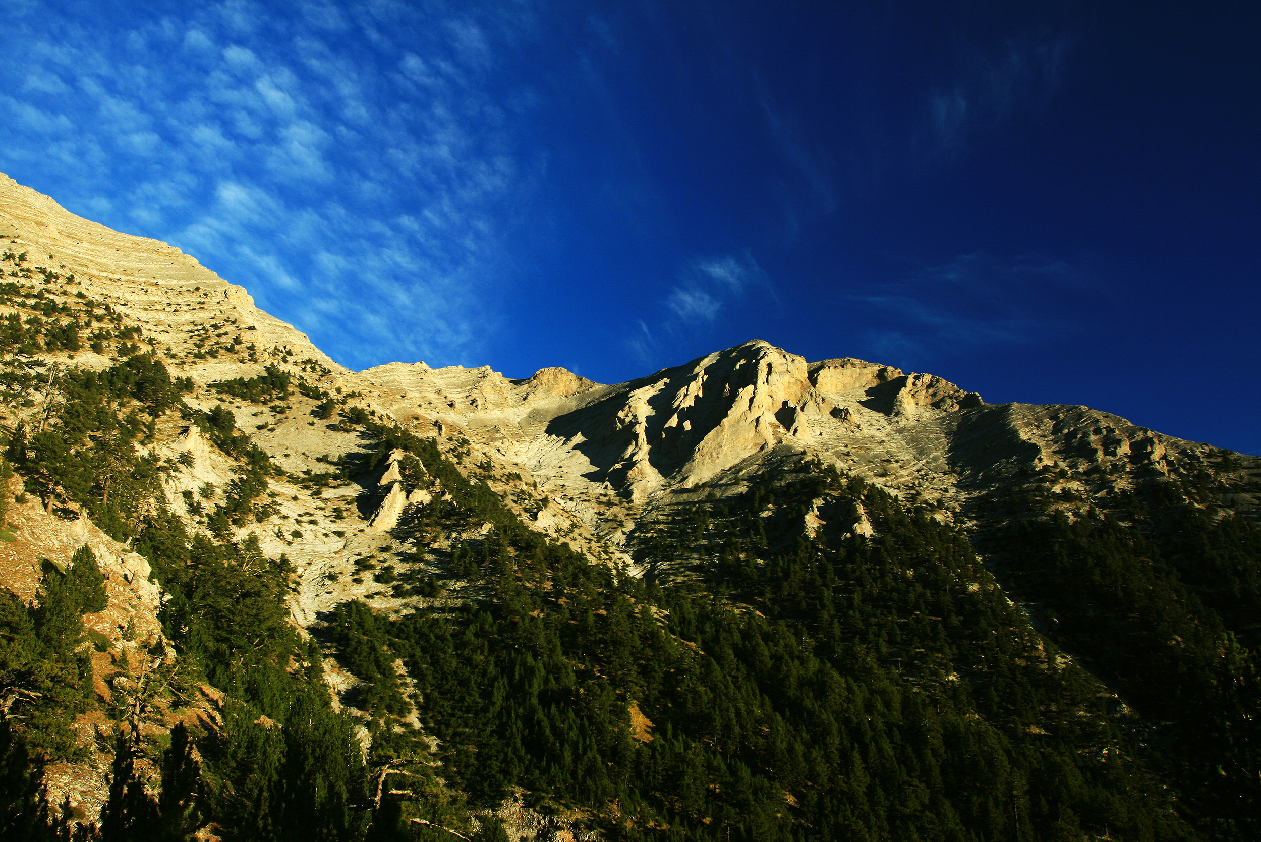 Οι κορφές όπως φαίνονται από το καταφύγιο "Σπήλιος Αγαπητός" This is a photography of Natura 2000 protected area with ID GR1250001